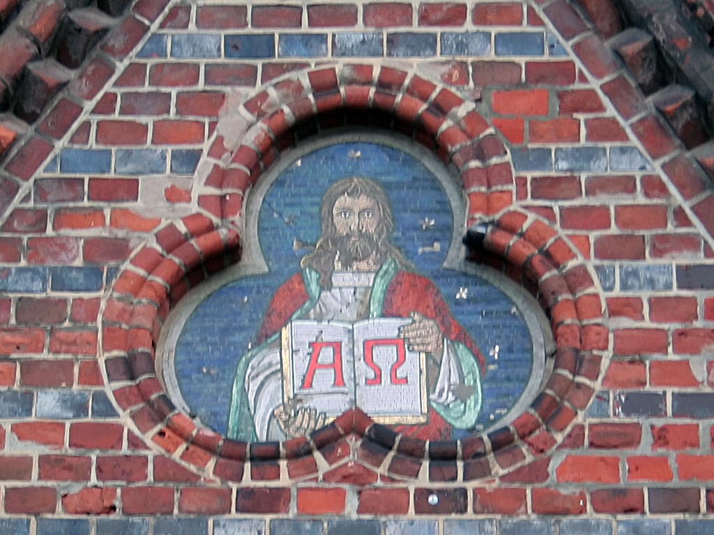 Blick auf ein Bild (?) an der ev.-luth. Nicolaikirche, Kiel. Christus hält ein Buch mit dem Zeichen Alpha und Omega.